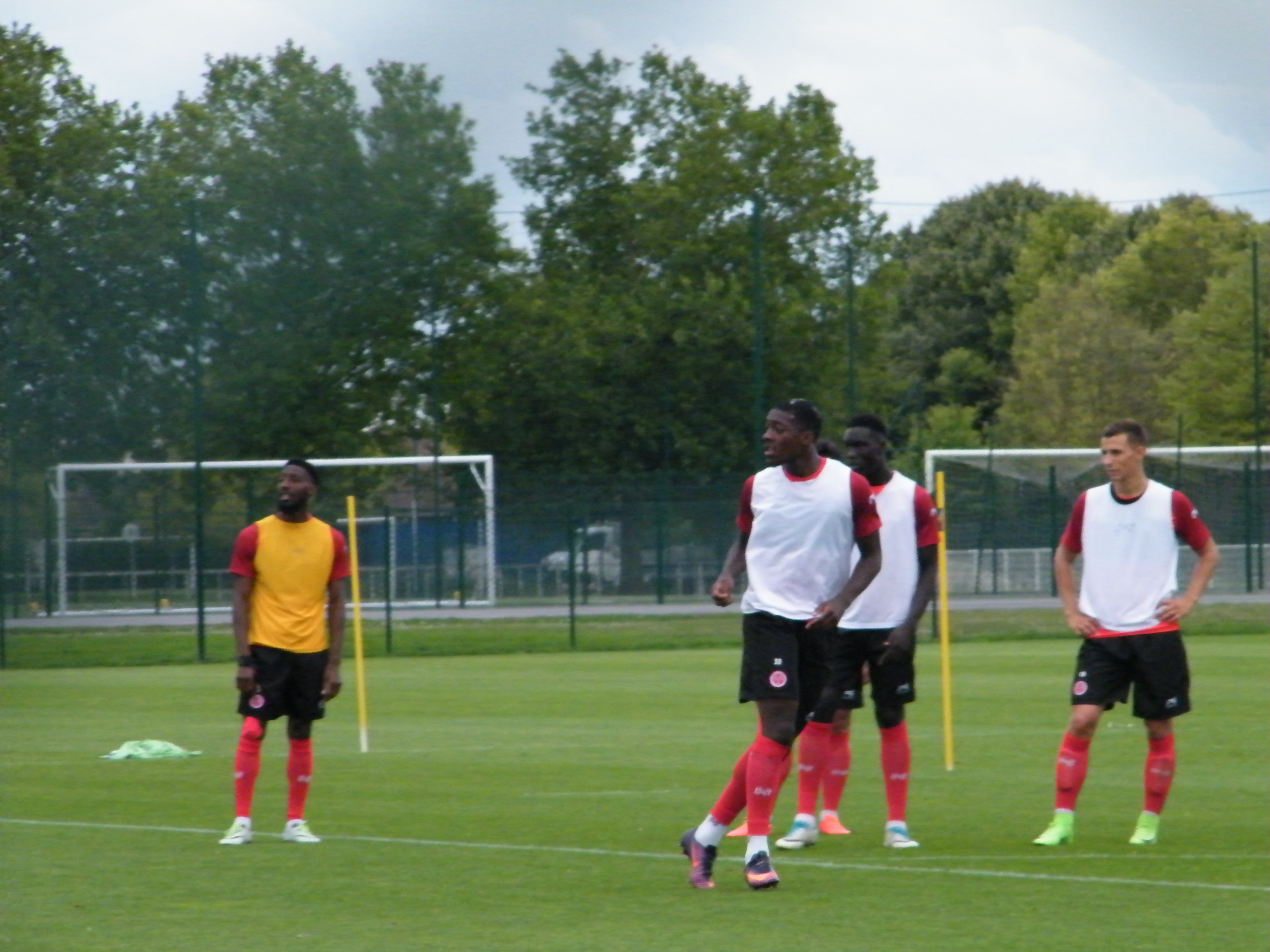 Metanire, Disasi, Ndom et Oudin.